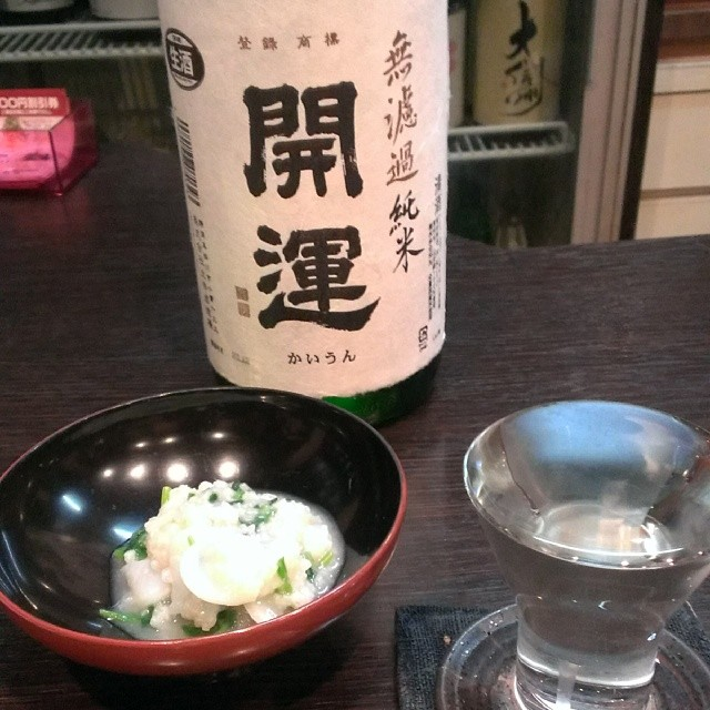 Kaiun Muroka Jummai and Nanakusa-gayu.